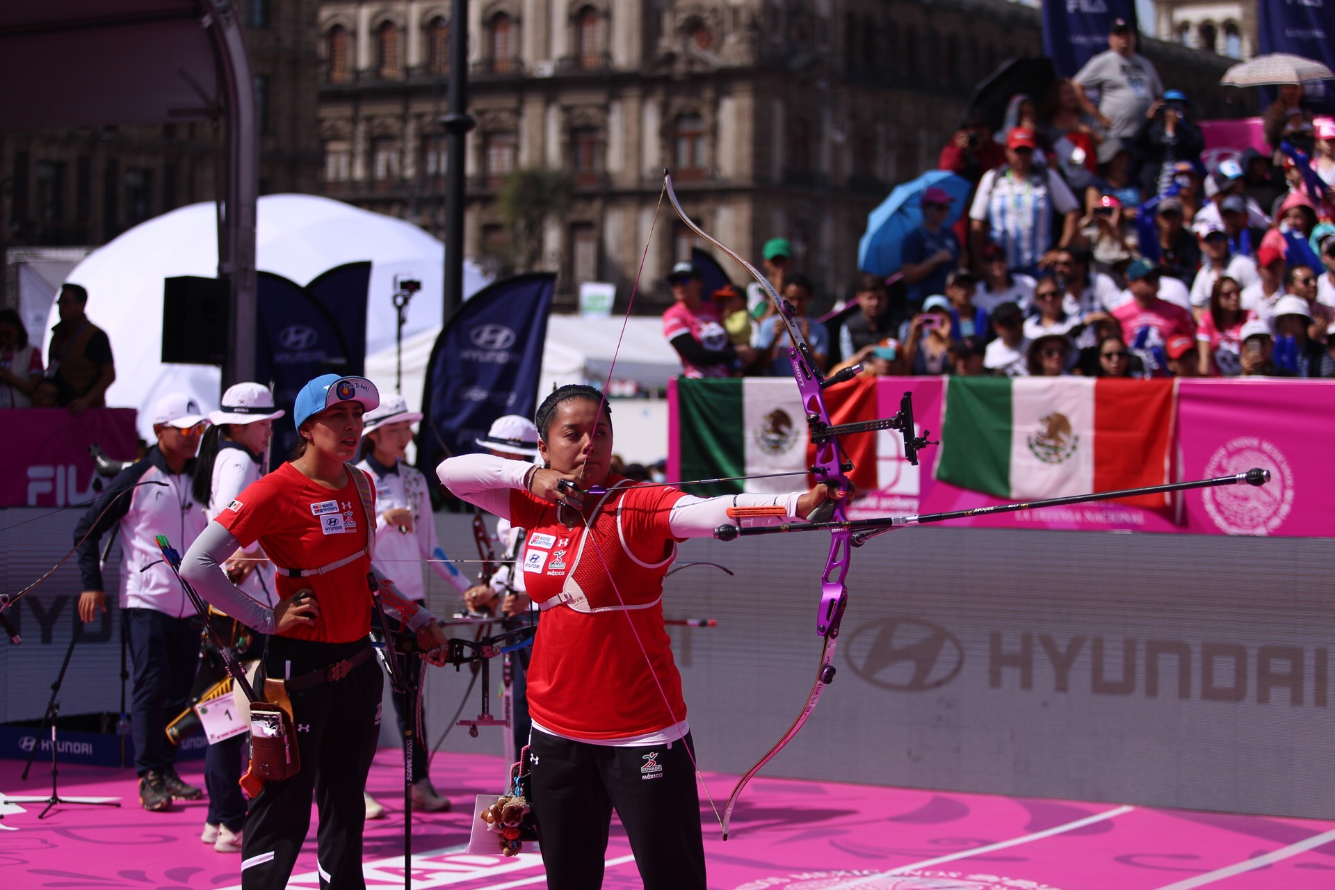 Campeonato de Tiro con Arco en el Zócalo de la Ciudad de México 2017